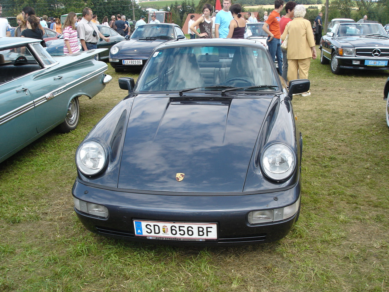 Porsche 911 Carrera